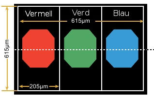 Slots RGB d'un FED